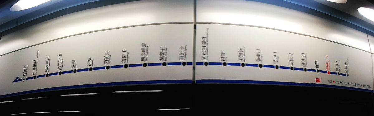 天津地铁九号线车站导视图